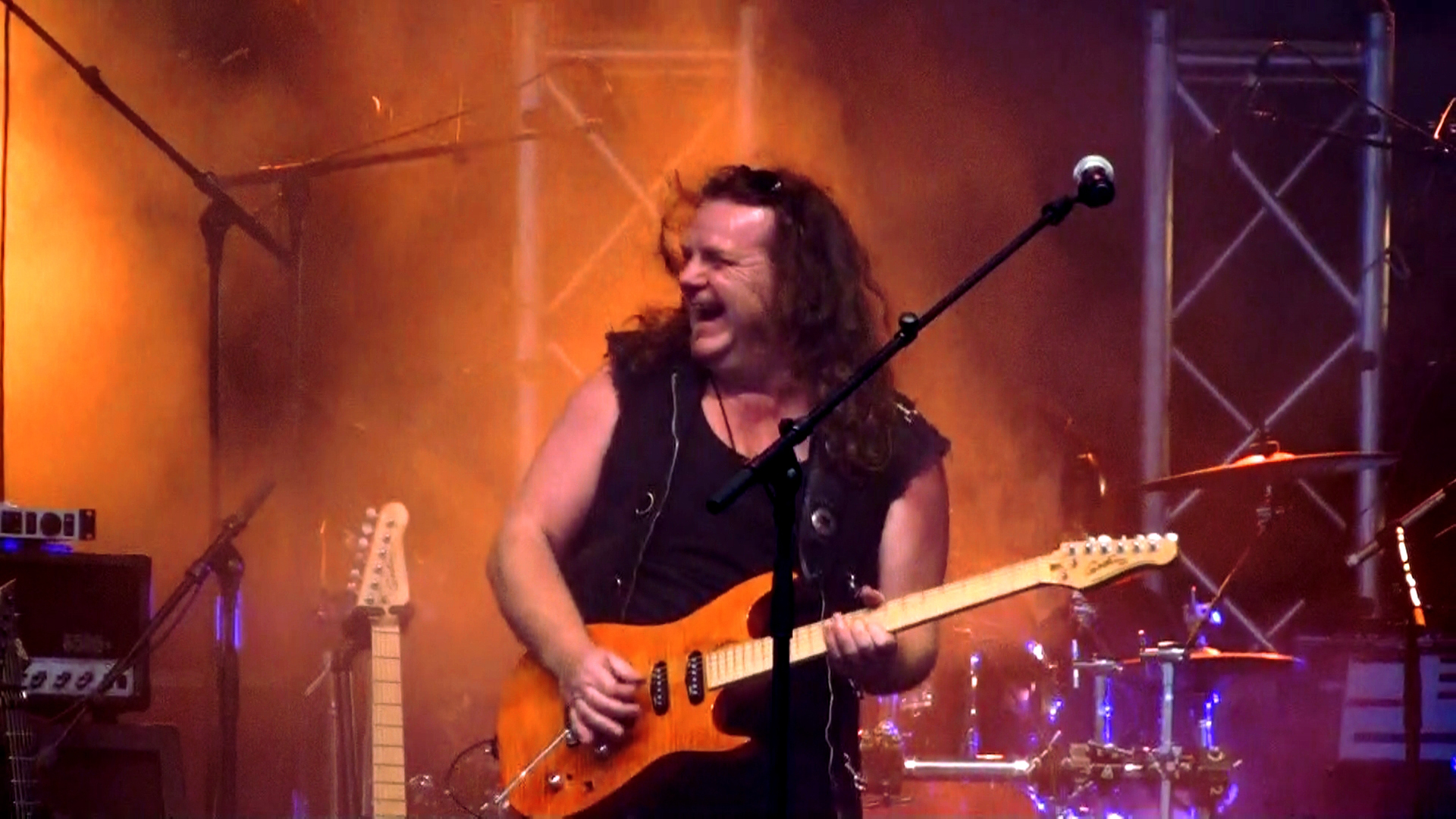 Le musicien Pat O'May partage sur scène sa bonne humeur, comme ici à Hillion en août 2011.